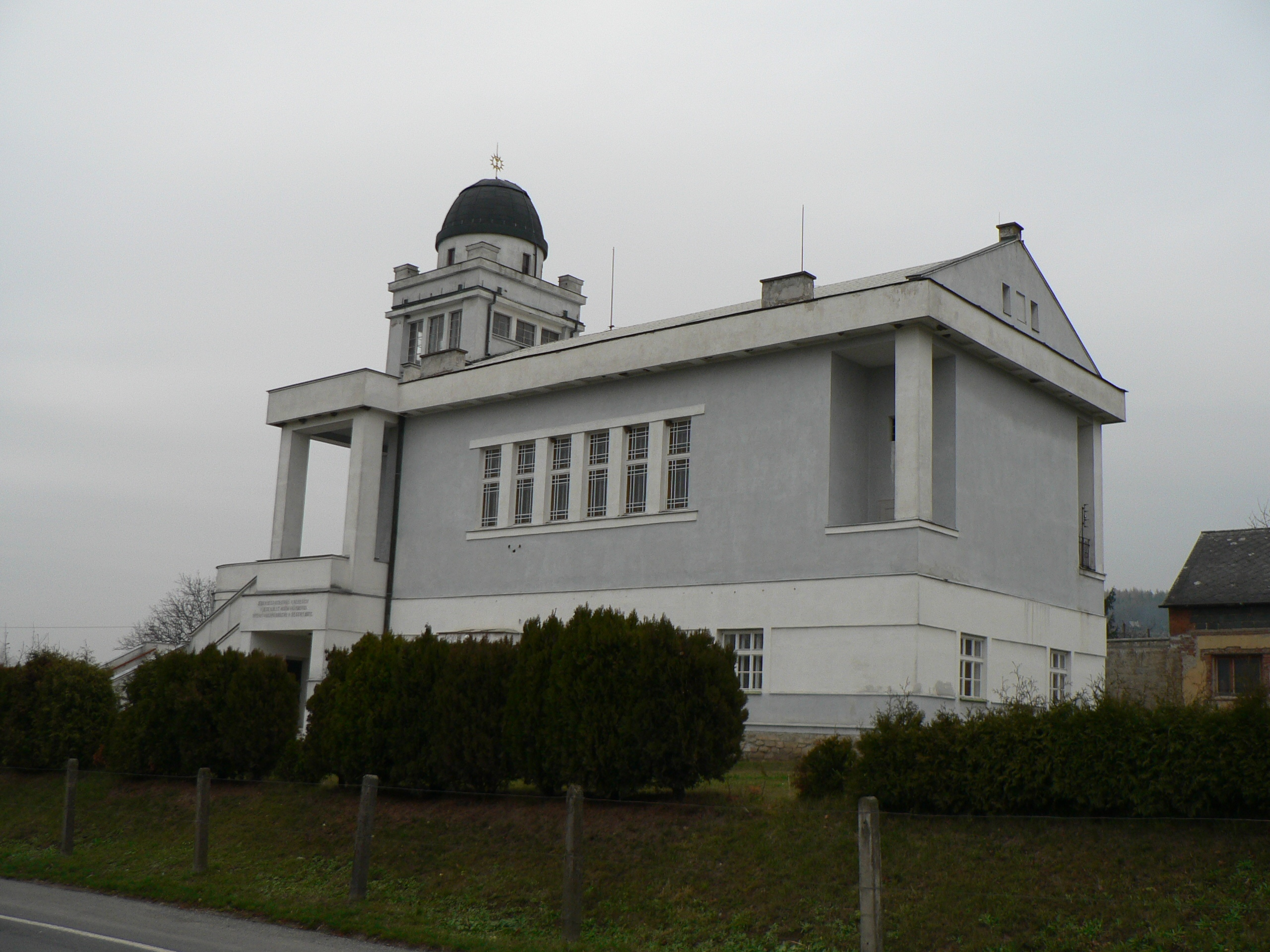 Modlitebna Českobratrského evangelického sboru v Hrabové